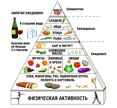 Специально, чтобы помочь людям включить Средиземноморскую диету, в свой ежедневный рацион питания, была разработана Пирамида Средиземноморской Диеты, на которой в графической и понятной форме отображен образец правильного и здорового питания